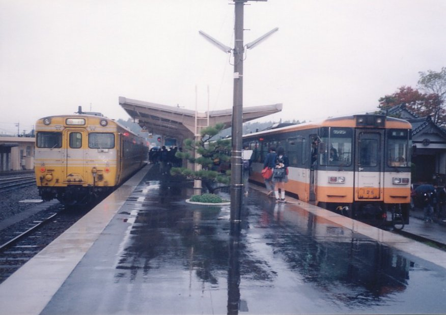 珠洲駅 ホームで並ぶのと鉄道NT100形と急行「能登路」